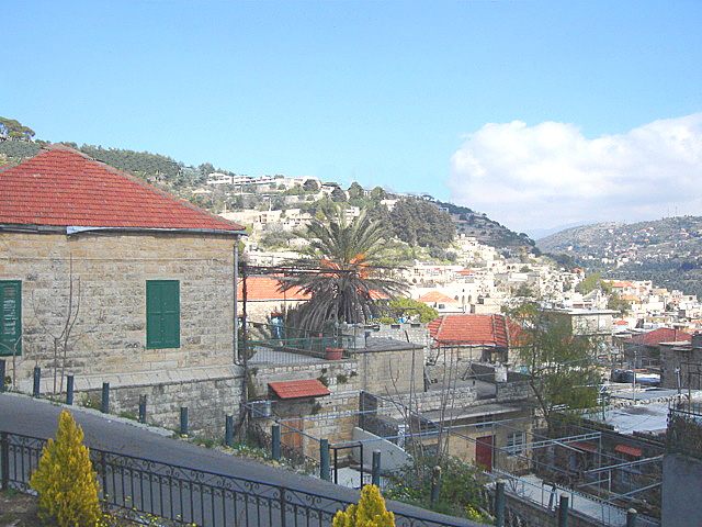 Deir El Qamar vue par Camille Allam